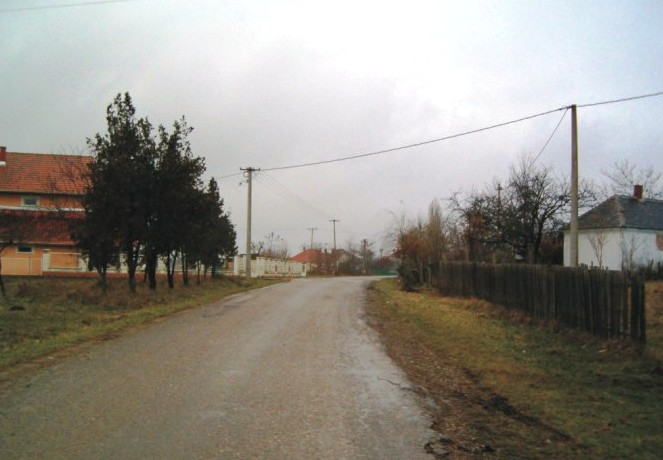 Улица у Кожуару.